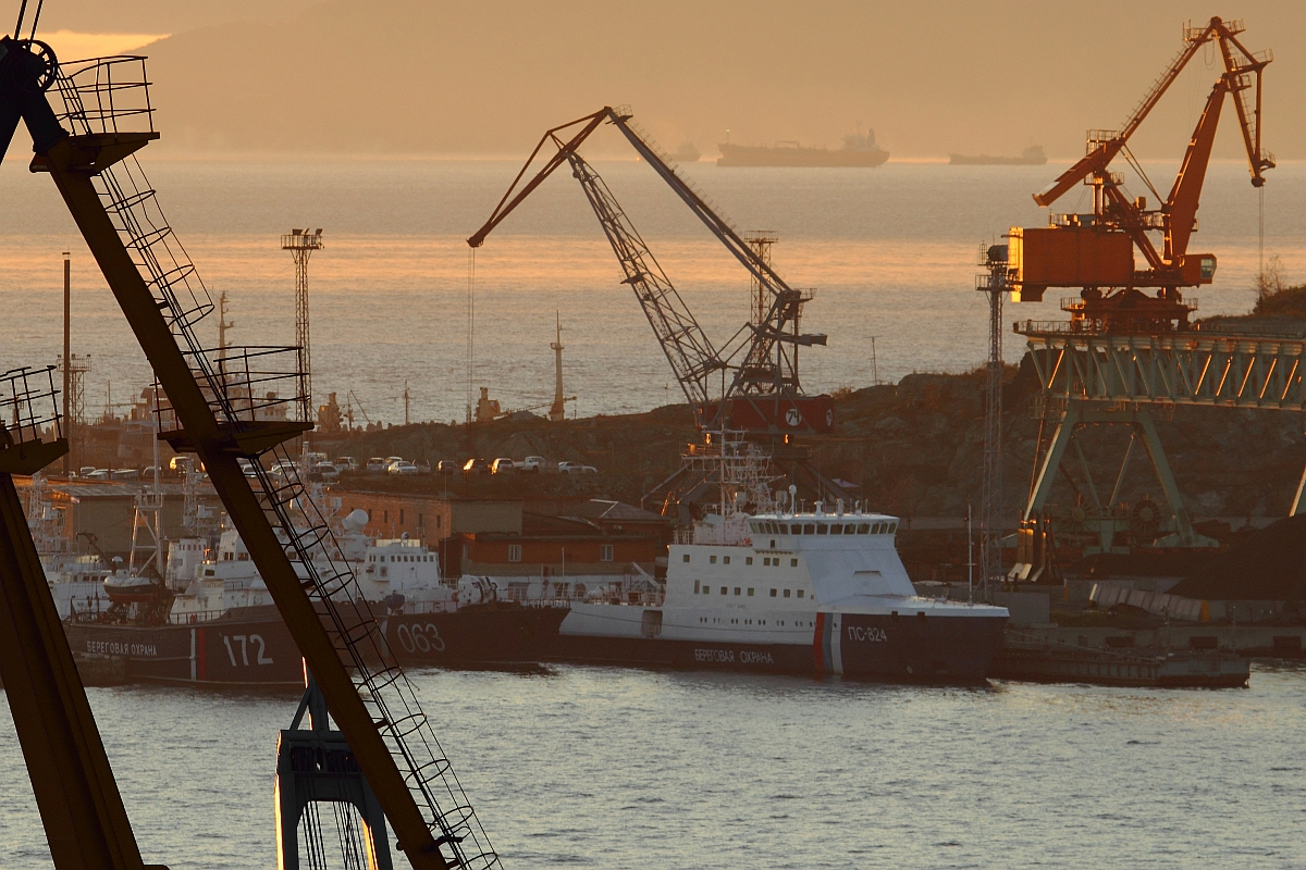 Корабли БОХР в Находке